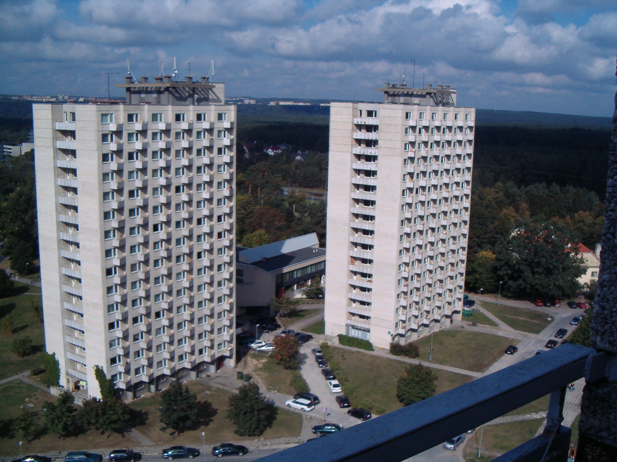 Antakalnis, Vilnius, Lithuania